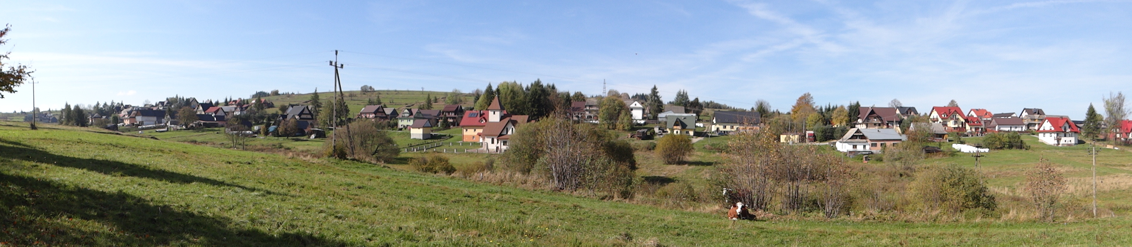 Bukowina-Osiedla, panorama widokowa